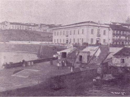 "Angra - Caes e Alfândega", freguesia da Sé, concelho de Angra do Heroísmo, ilha Terceira, Açores, in Álbum Açoriano, fascículo nº 43, 1903, p. 339.